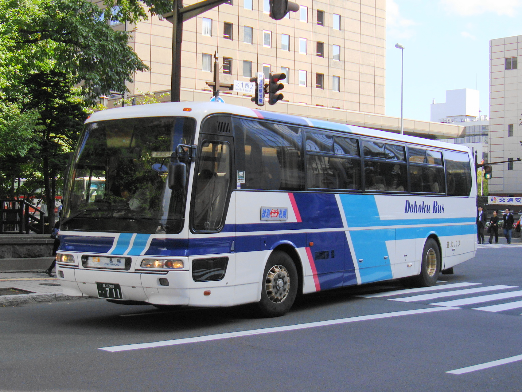 "Kōsoku Ryūhyō Monbetsu gō" Monbetsu to Sapporo